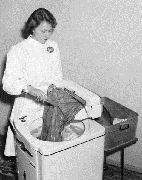 kvinne, Servis vaskemaskin med vrimaskin.